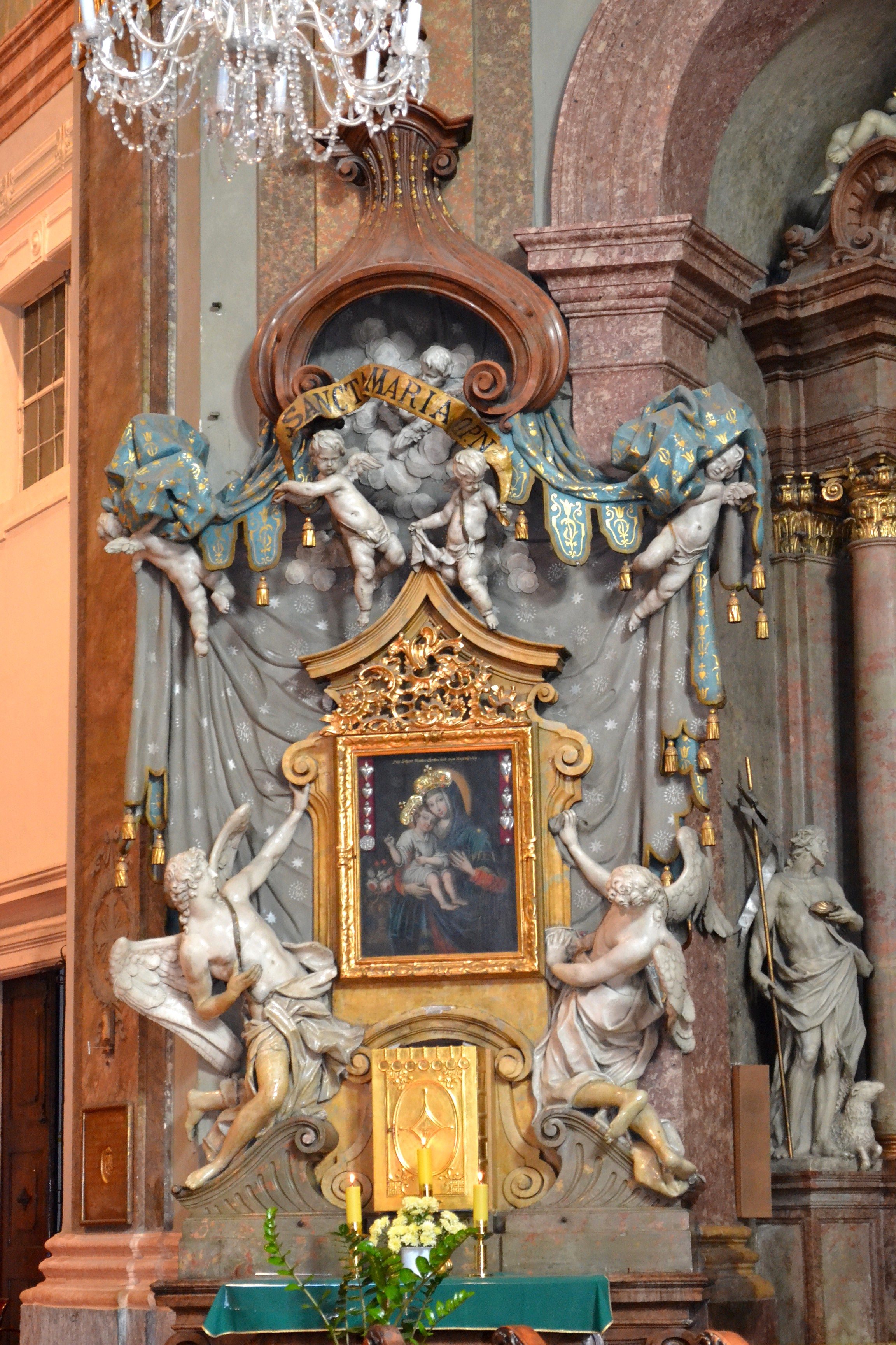 Oltár s obrazom Zázračnej Panny Márie z roku 1736